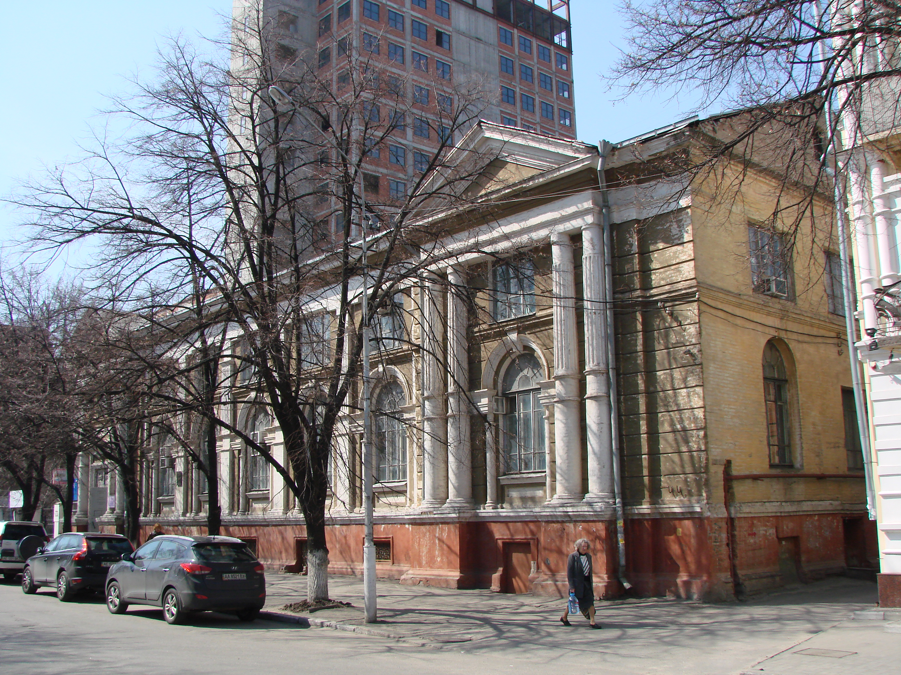 Аудиторія Наукового товариства, Дніпропетровськ, вул.Плеханова, 42